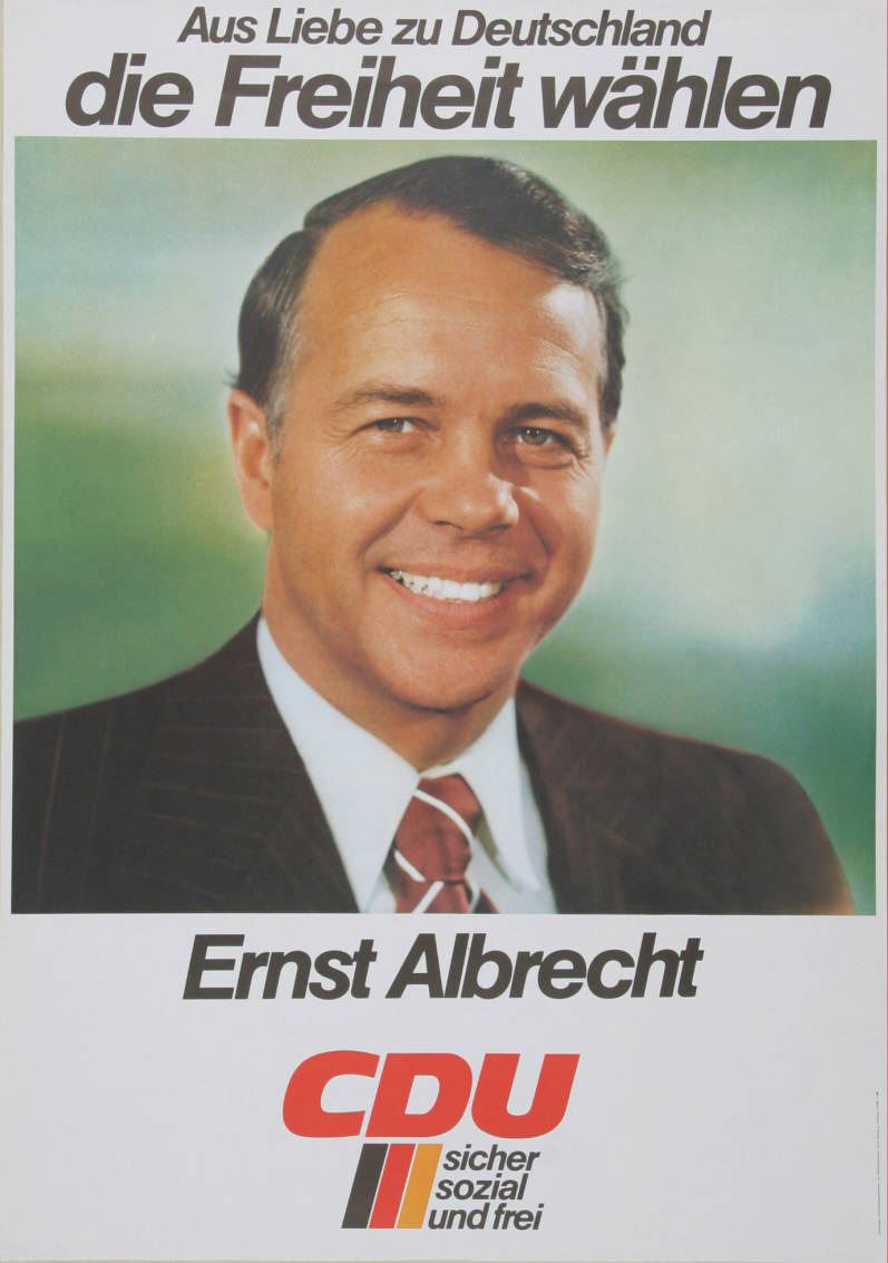 Aus Liebe zu Deutschland die Freiheit wählen Ernst Albrecht CDU sicher sozial und frei Abbildung: Porträtfoto Plakatart: Kandidaten-/Personenplakat mit Porträt Auftraggeber: CDU-Bundesgeschäftsstelle, Abt. Öffentlichkeitsarbeit, Bonn Drucker_Druckart_Druckort: Stalling AG, Oldenburg Objekt-Signatur: 10-001: 1820 Bestand: Plakate zu Bundestagswahlen (10-001) GliederungBestand10-18: Plakate zu Bundestagswahlen (10-001) » Die 8. Bundestagswahl am 3. Oktober 1976 » CDU » Mit Porträtfoto Lizenz: KAS/ACDP 10-001: 1820 CC-BY-SA 3.0 DE